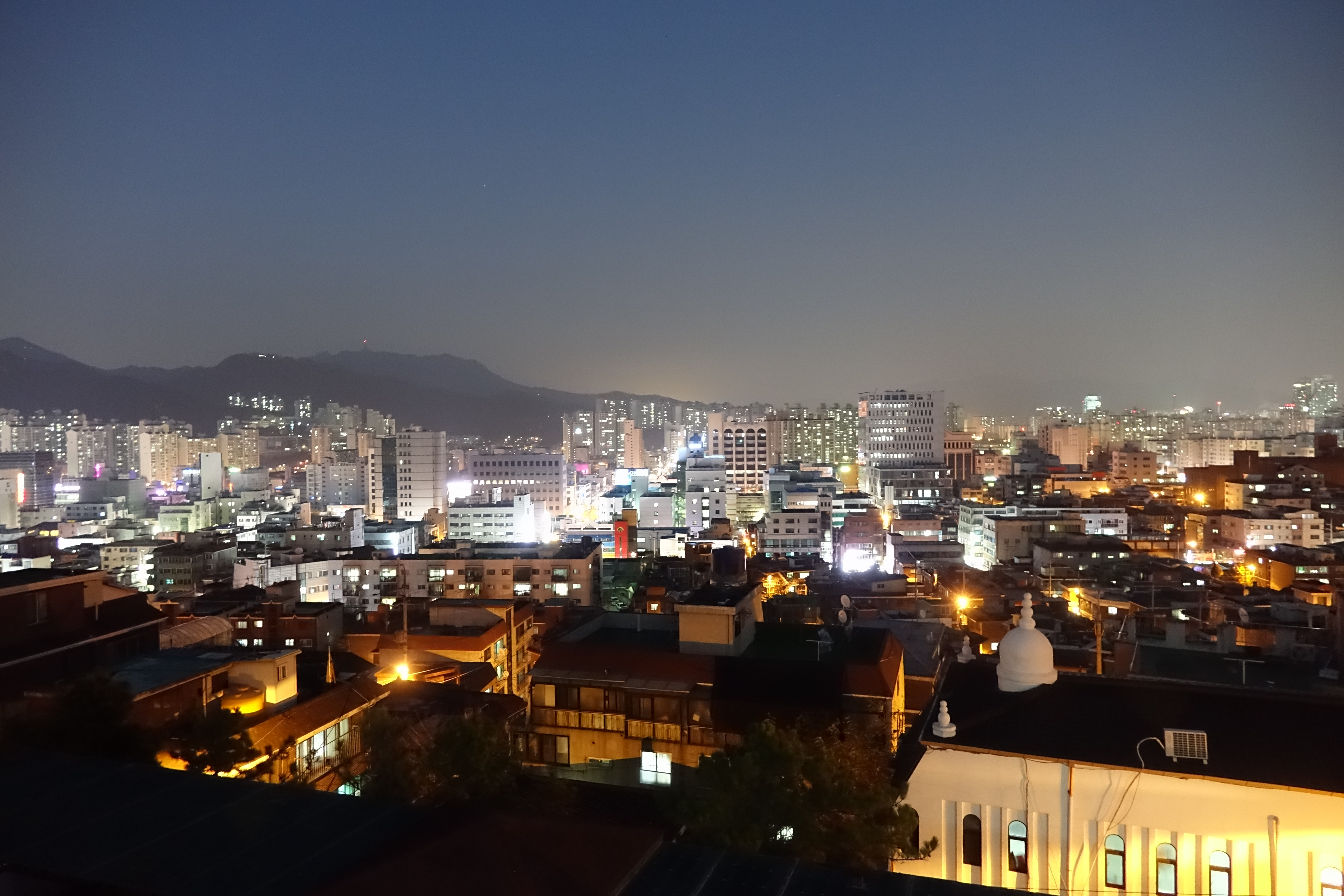 2014년 12월 20일 경 촬영(Kwangmo's SONY RX10)